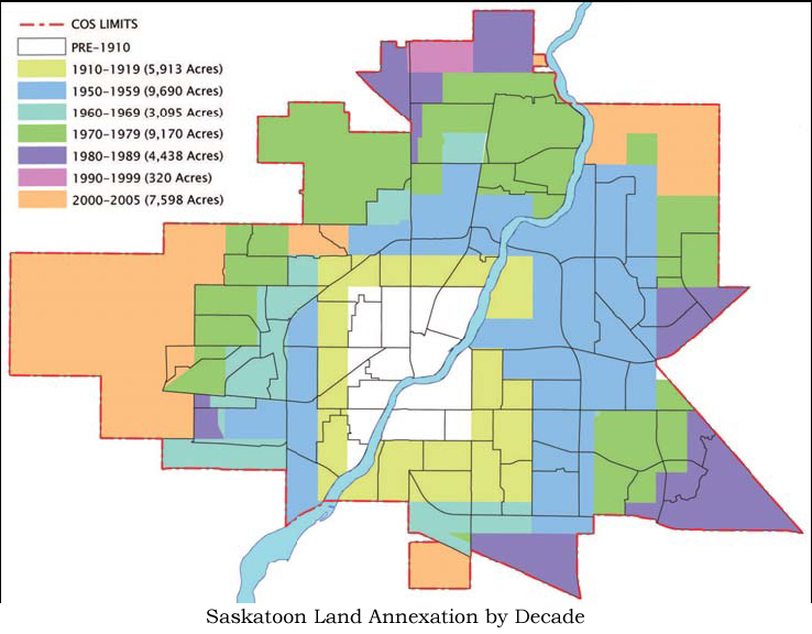 Saskatoon Land Annexation By Decade 1911–2005 Saskatoon, Saskatchewan, Canada